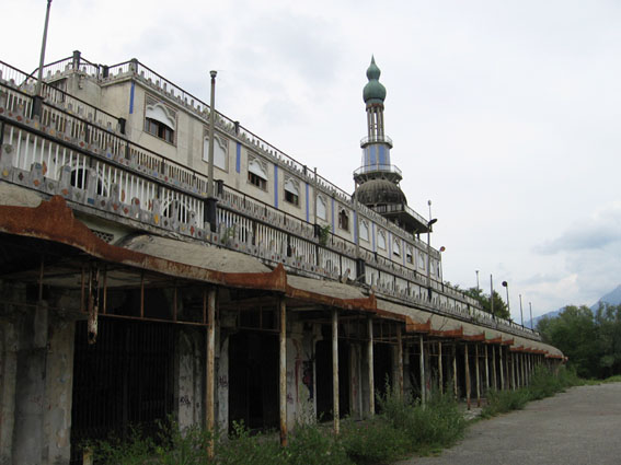 Buggio Marco